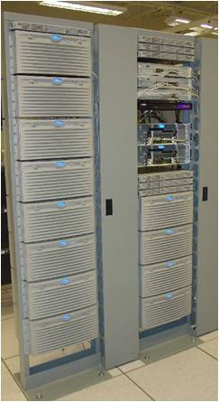 Nortel CS1000 in Racks